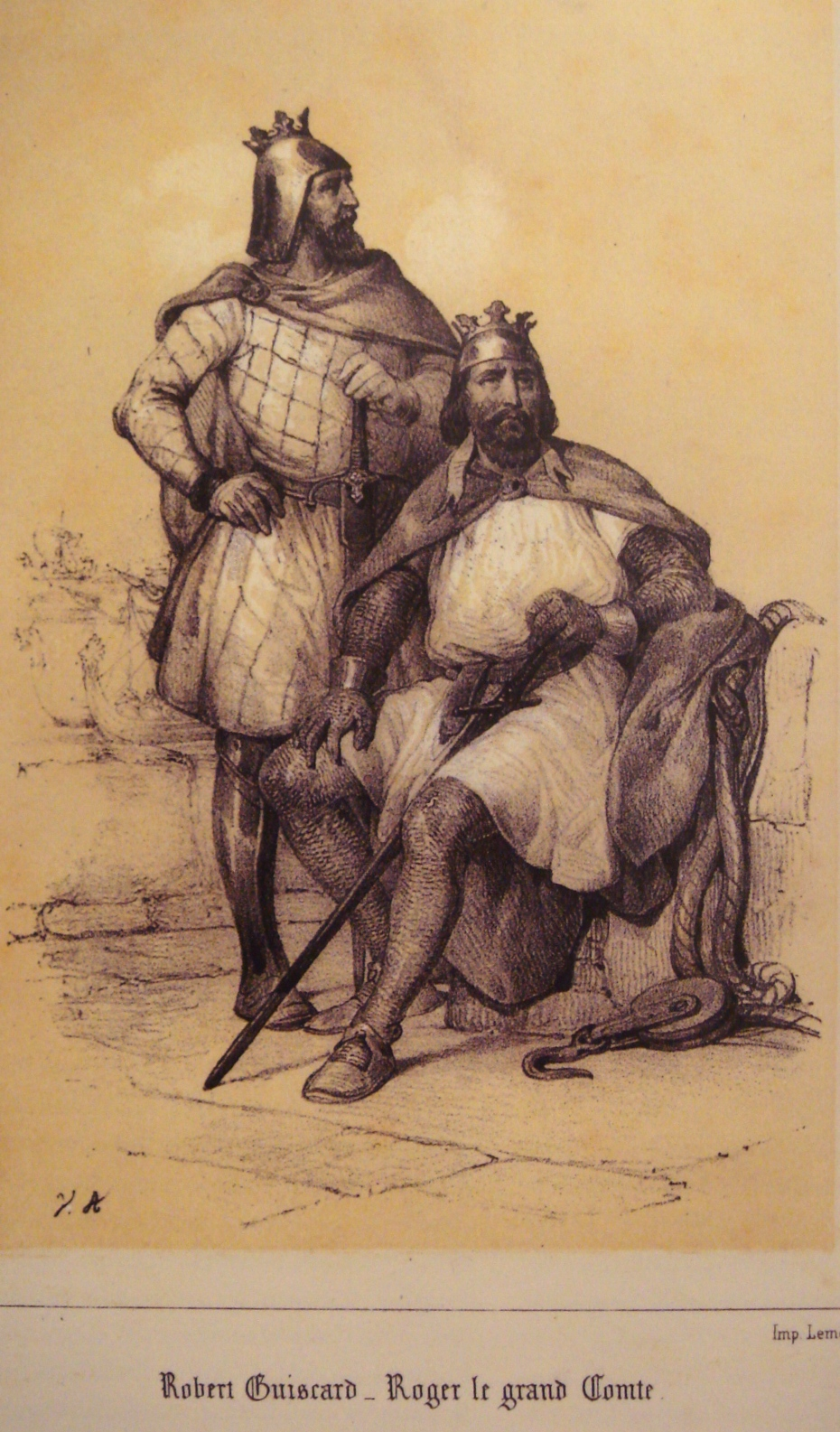 Robert Guiscard And Count Roger